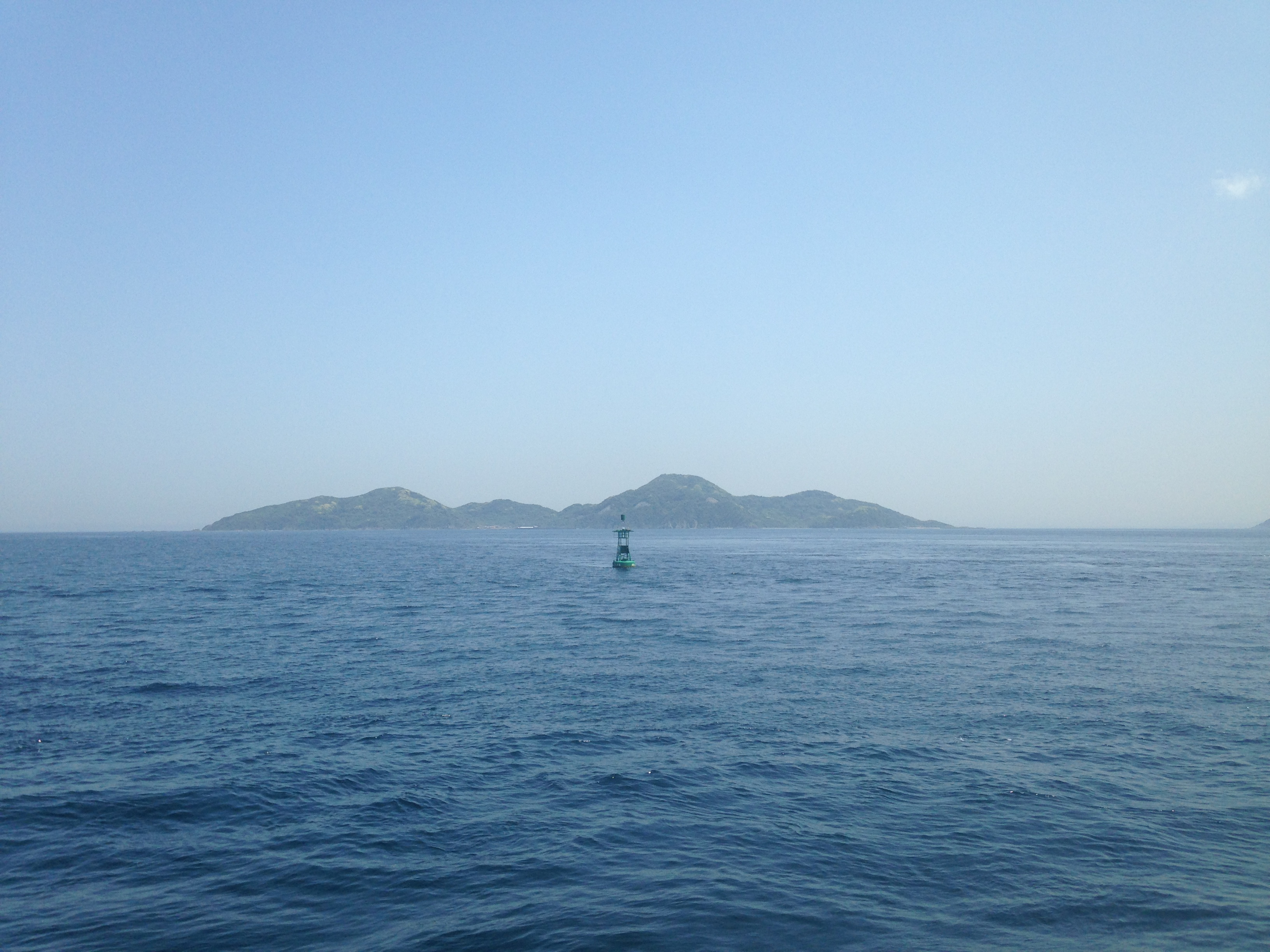 筑前大島行きの「フェリーおおしま」より望む地島